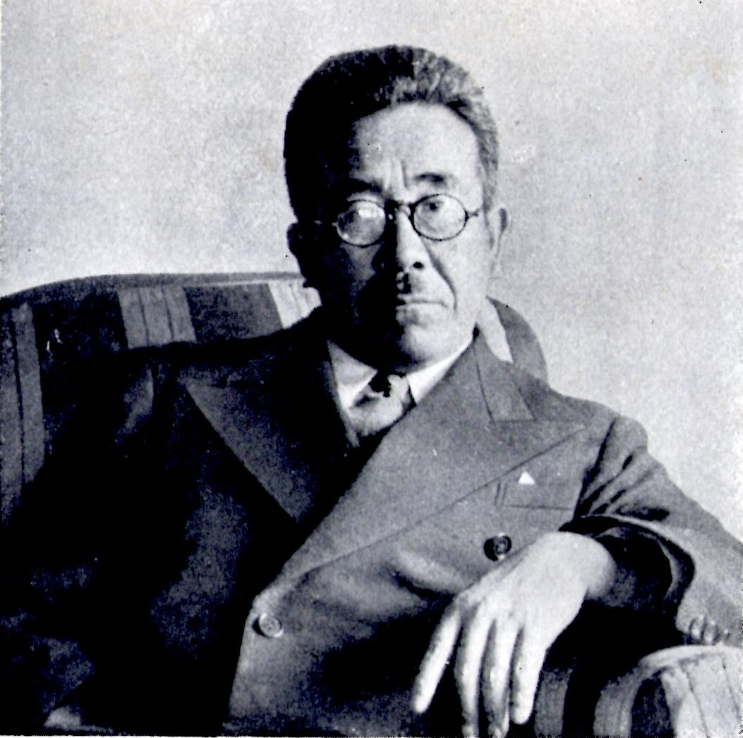 辰野隆『ふらんす人』青木書店、昭和12年発行よりスキャン。